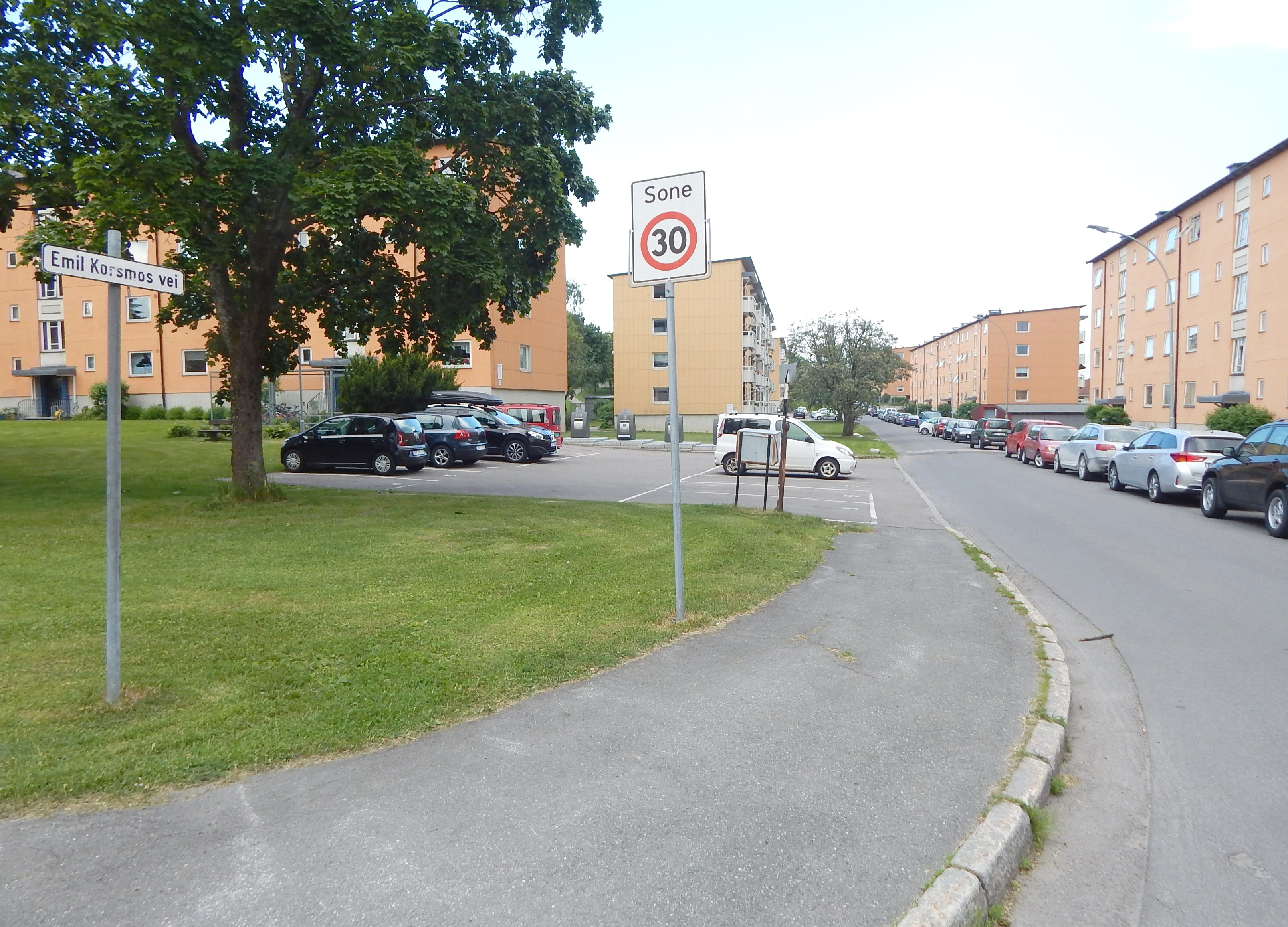 Emil Korsmos vei